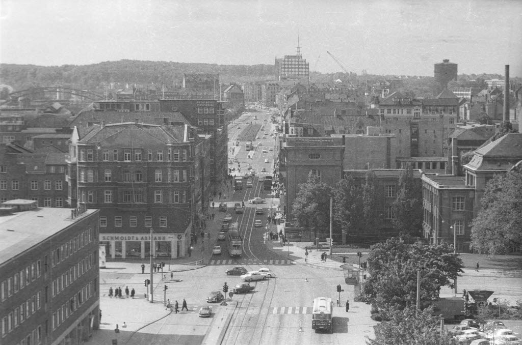 Blick vom Hotel Astor an der Andreas-Gayk-Straße durch das Sophienblatt. Im Vordergrund rechts das Thaulow-Museum, hinten links die Gablenzbrücke.